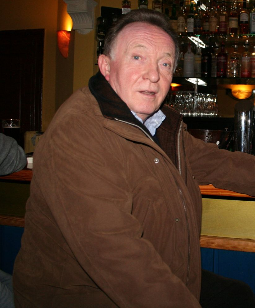 Peter Sodann nach einer Lesung aus seiner Autobiographie "Keine halben Sachen" im Wormser Café Aqui